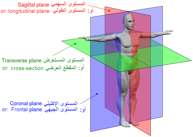 الثلاثة مستويات المرجعية الأساسية في التشريح